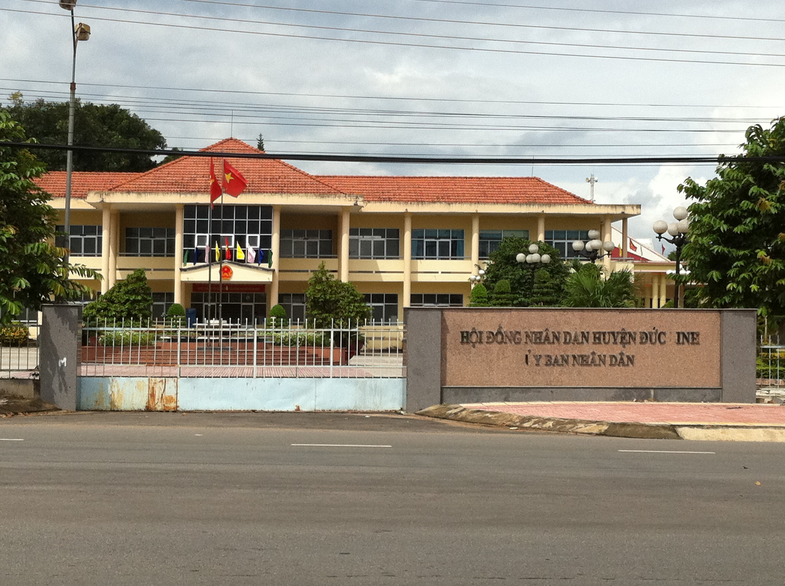 Trụ sở UBND huyện Đức Linh